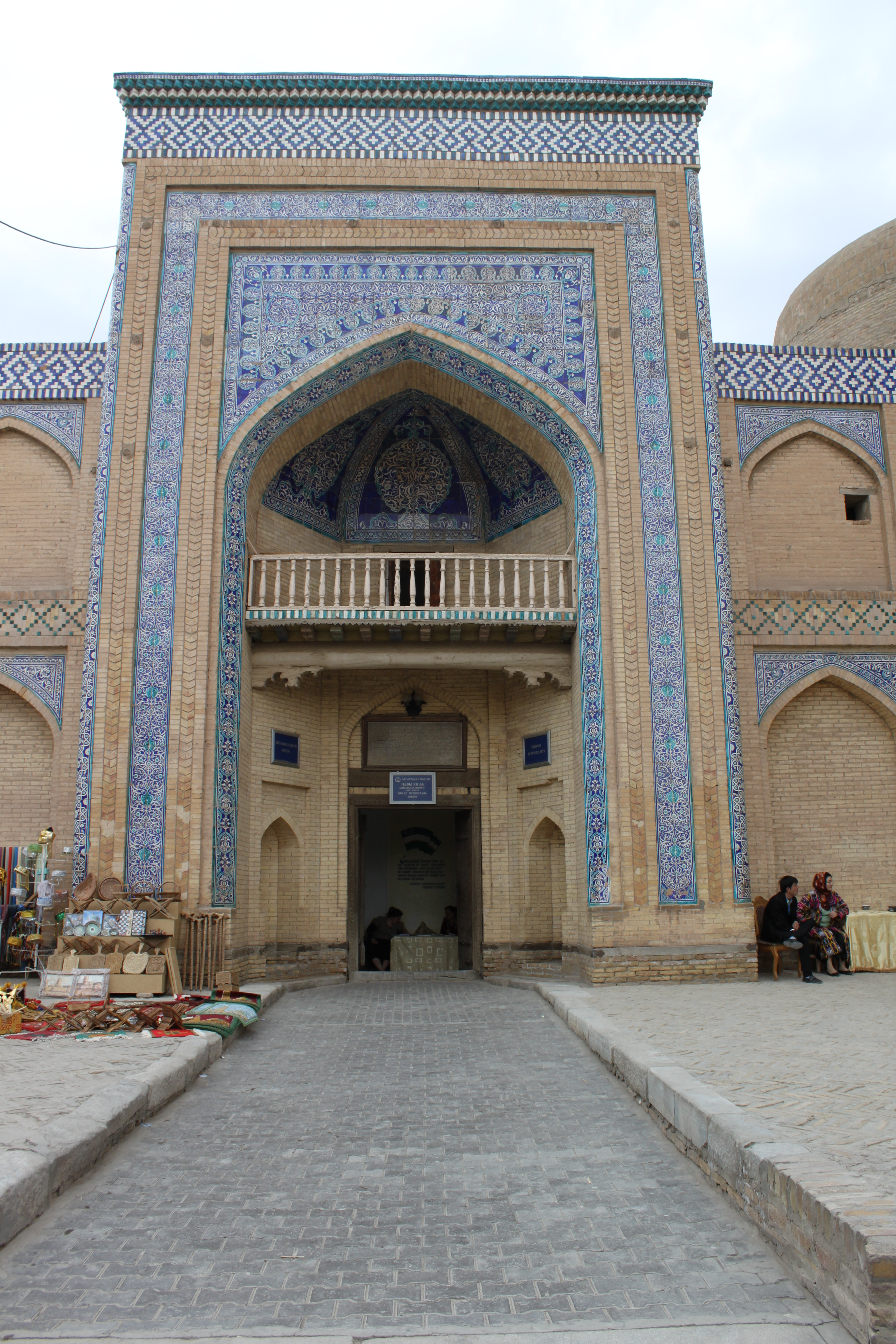 Portail (pistak) de la madrasa Islam Khodja à Khiva